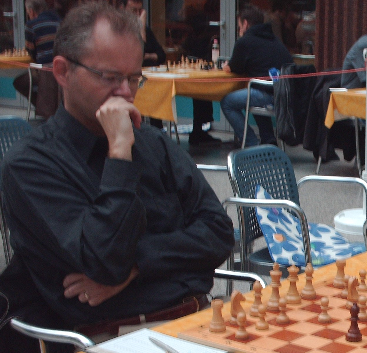 Curt Hansen am 29. Oktober 2006 bei einem Bundesliga-Wettkampf in Berlin-Tegel